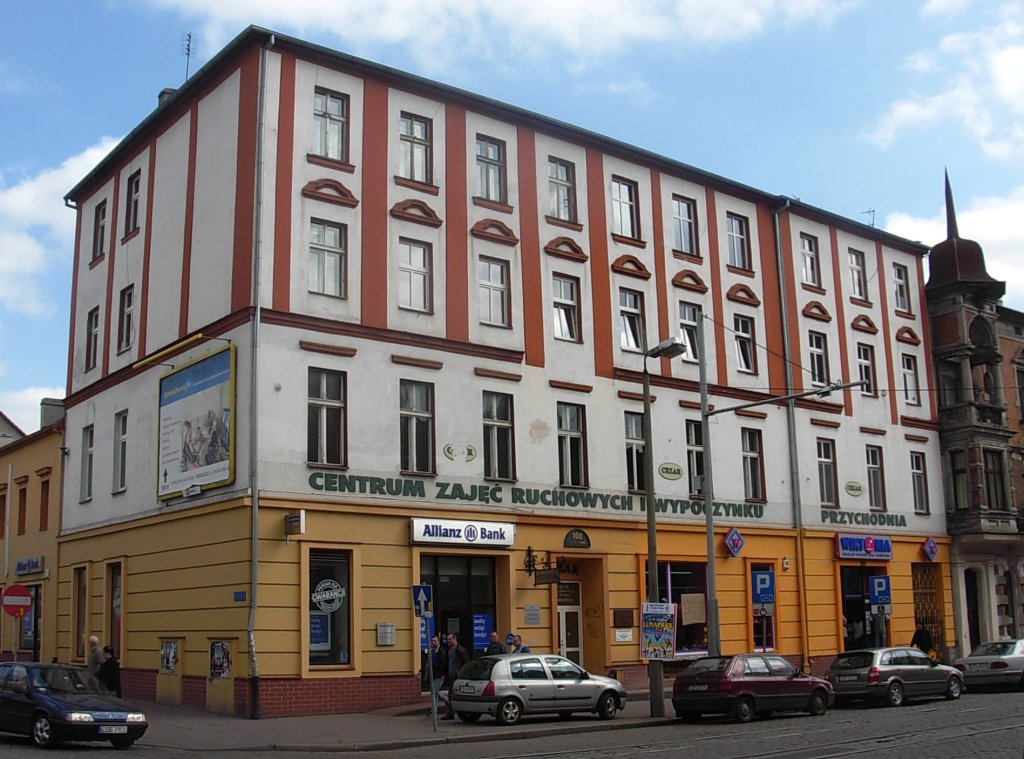 Kamienica ul. Dworcowa 100 w Bydgoszczy